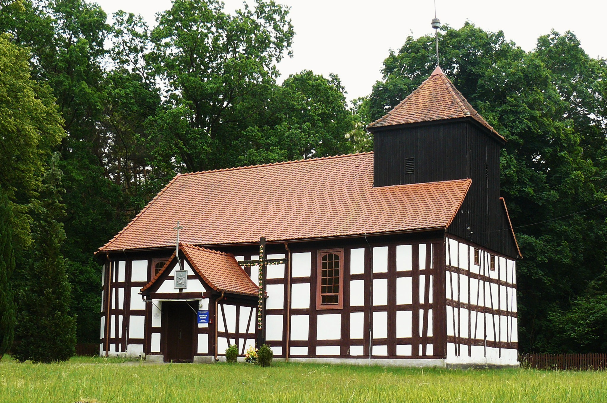 Karwin - dawny kościół ewangelicki, obecnie rzymskokatolicki filialny p.w. Podwyższebia Krzyża Świętego, XVIII